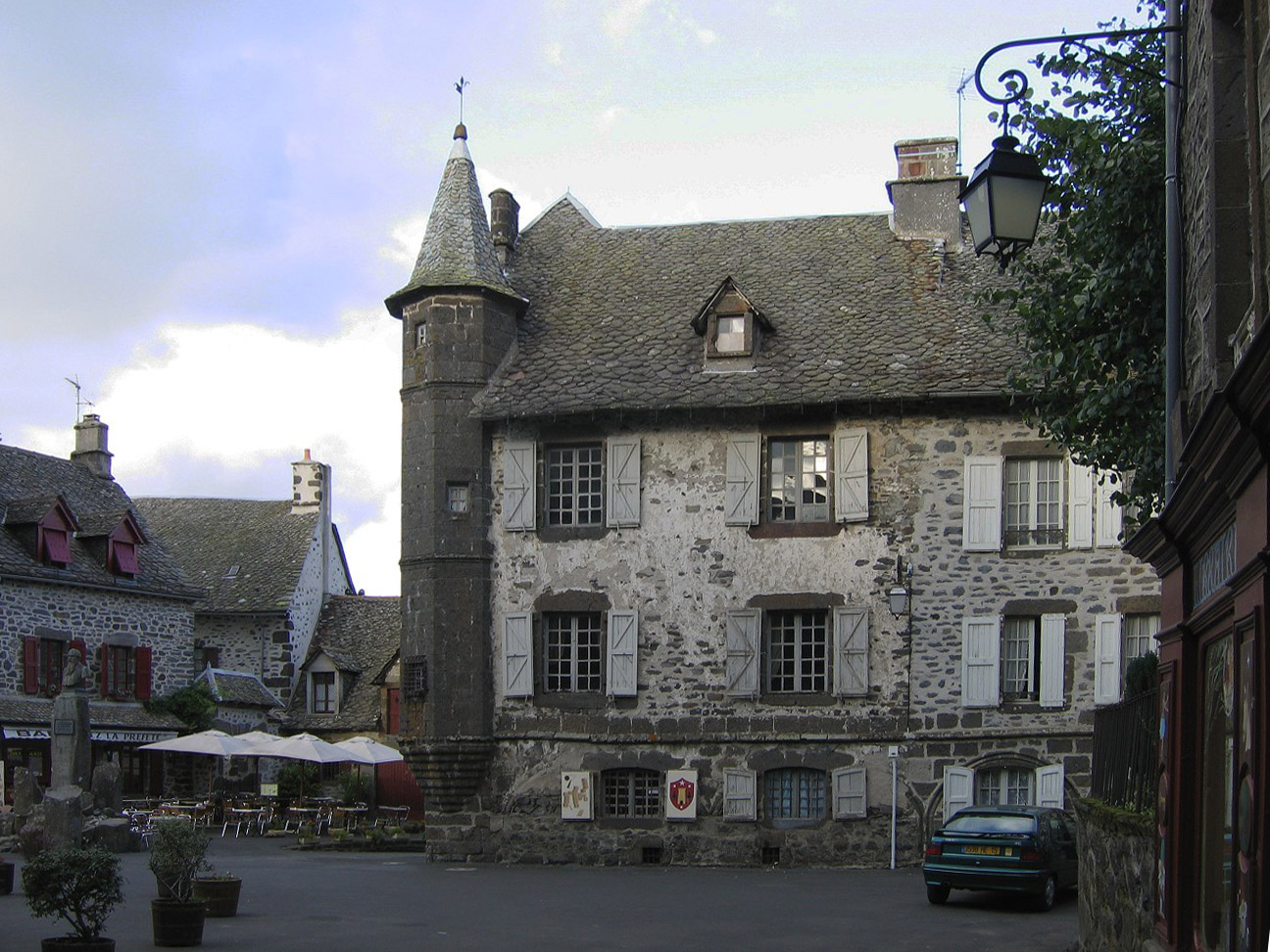 Salers, Großer Platz und Ancien Baillage (alte Vogtei). andere Versionen: keine